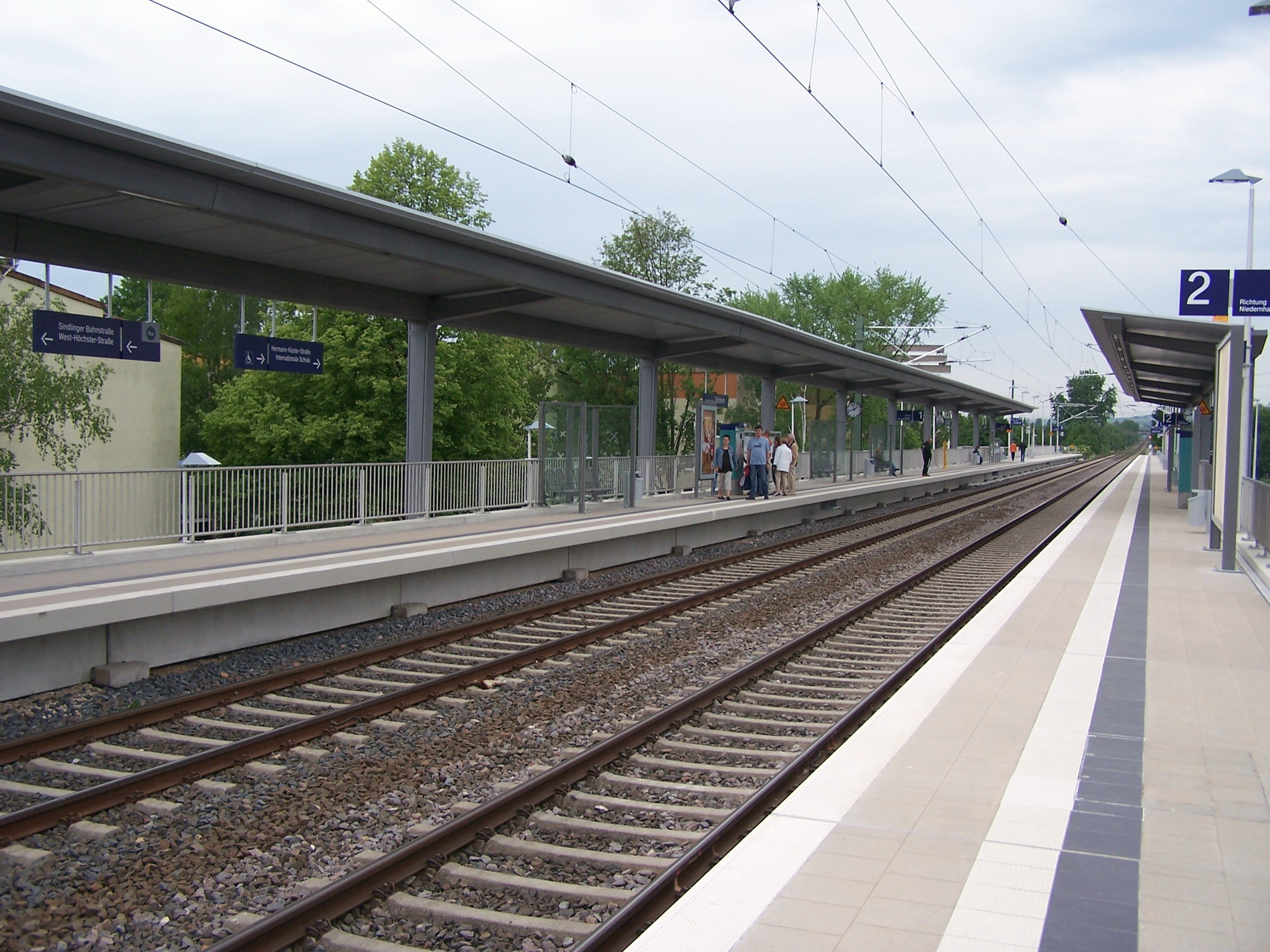 Gleis 1 des Zeilsheimer Bahnhofs